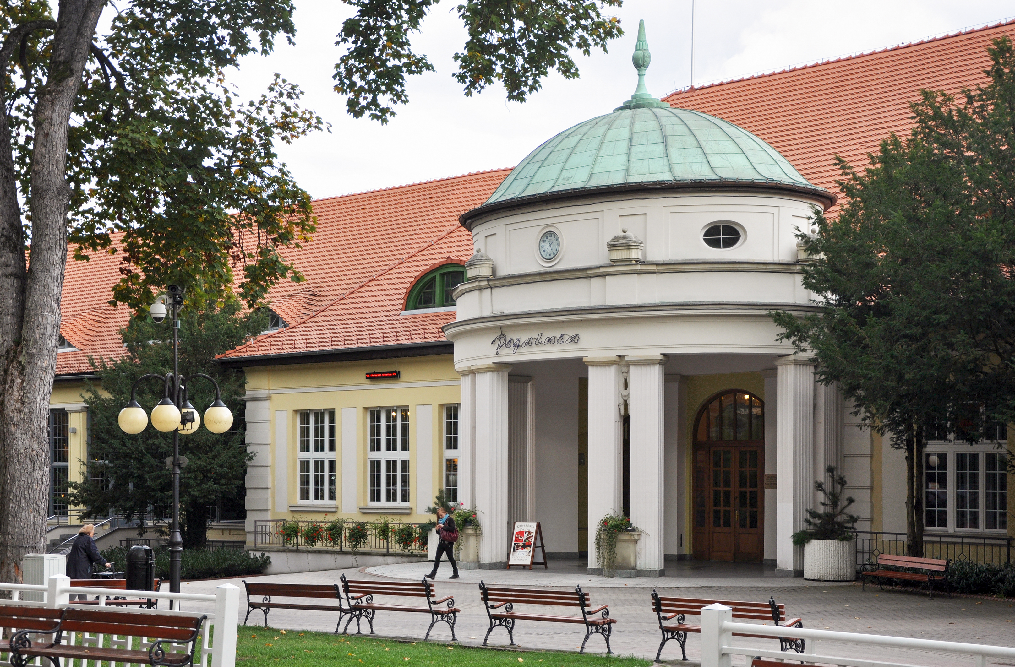 Polanica-Zdrój, dom zdrojowy, 1911 (w parku zdrojowym)